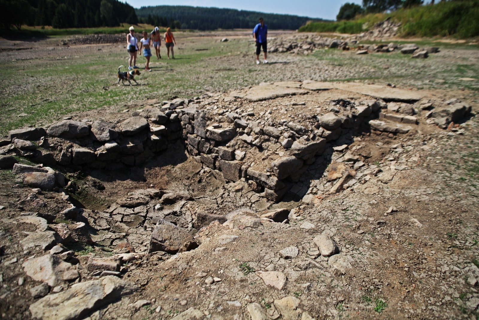 Zaniklá obec Fláje